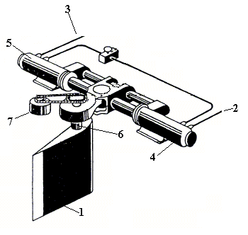 design of rudder operation